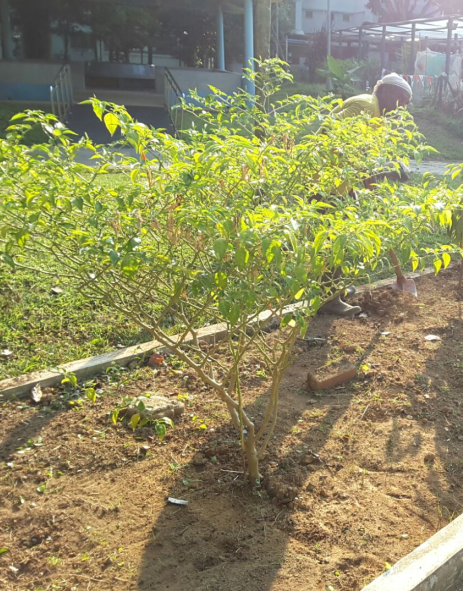 Cili padi di Singapura